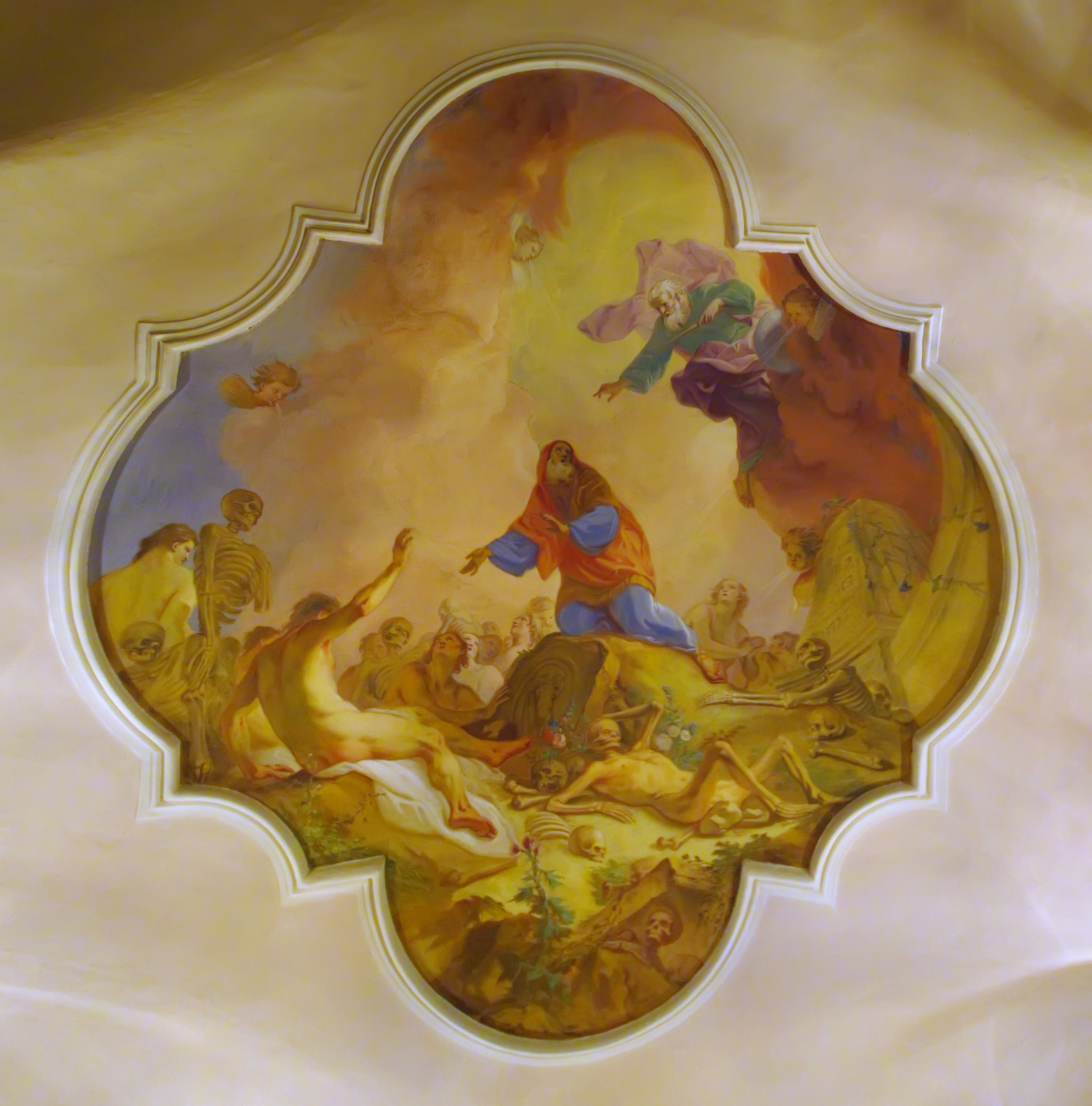 Vision des Ezechiel von der Auferweckung von den Gebeine